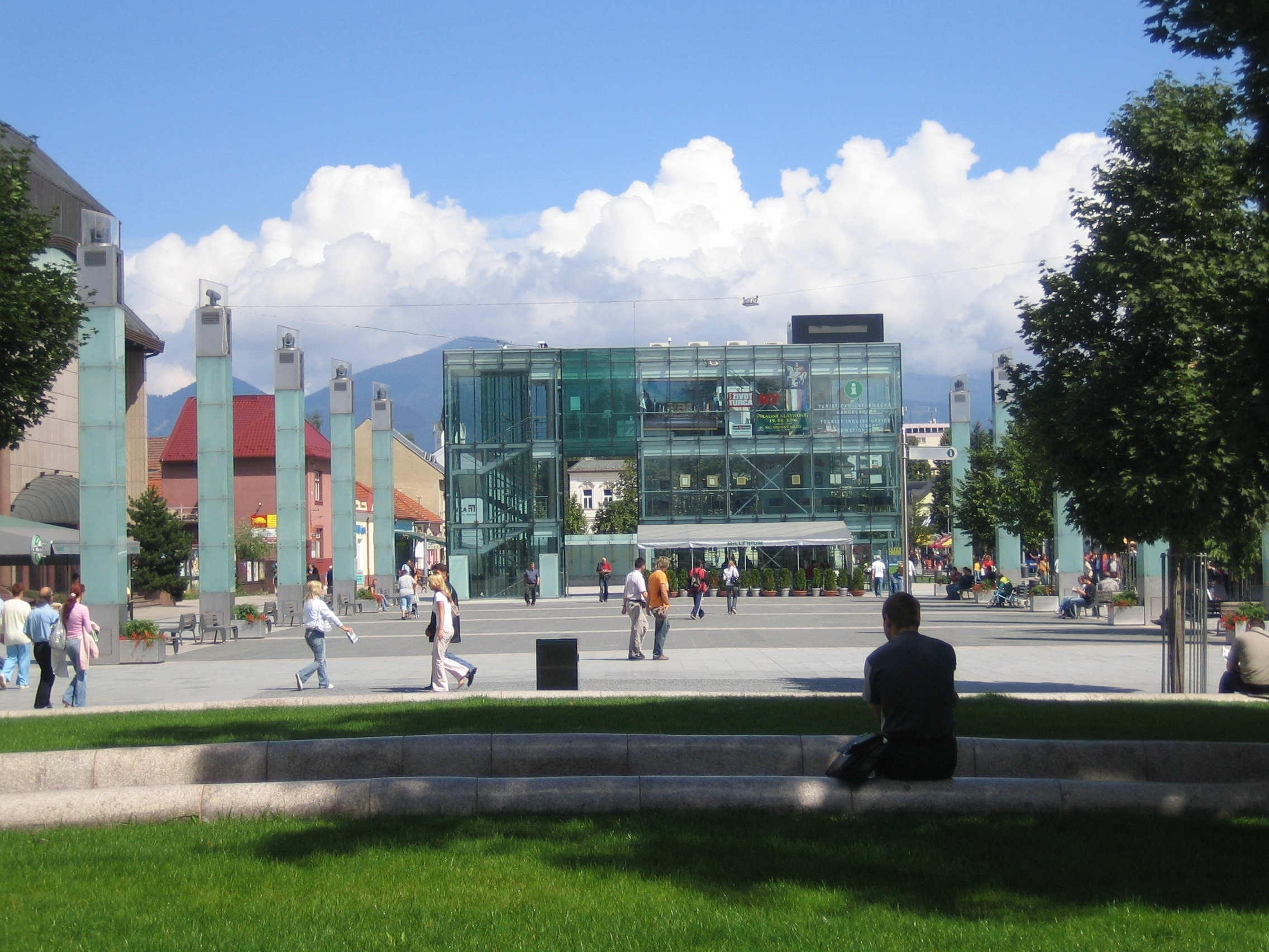 Martin (SVK), plaza